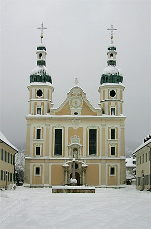 Arlesheim: Dom